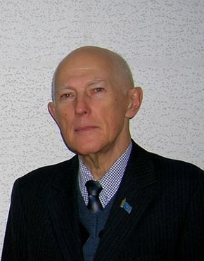 Зеновівй-Тарас Масний